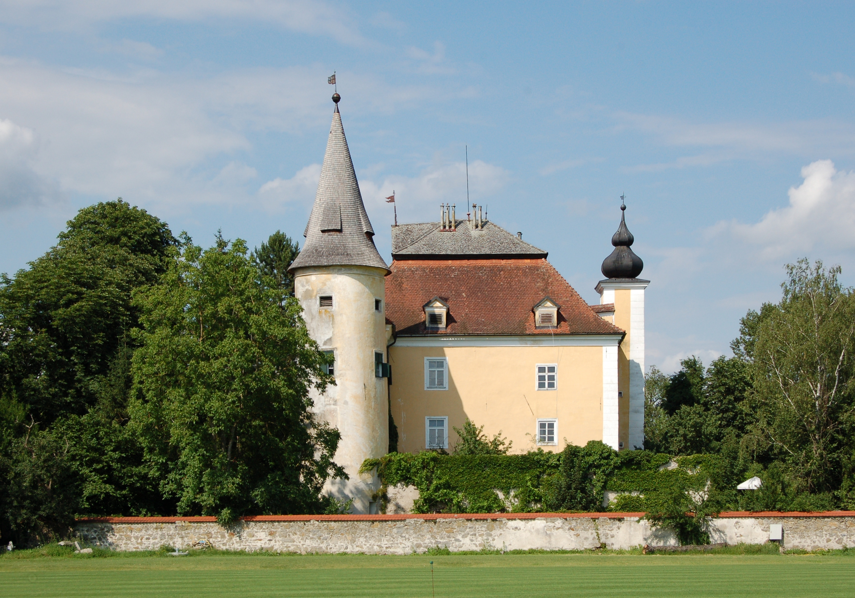 Das Schloss Mühldorf wurde im 15. bis frühen 16. Jahrhundert errichtet und im späten 16. bis frühen 17. Jahrhundert zu einem Renaissance-Wasserschloss umgebaut. Nach 1686 erfolgte eine barocke Umgestaltung und die Trockenlegung des Wassergrabens.